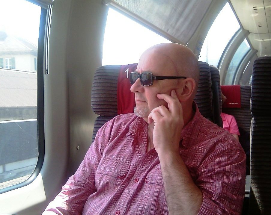 Henk van Zuiden (Apeldoorn, 7 januari 1951) is een Nederlandse dichter, bloemlezer en dierenbeschermer. In trein Basel-Utrecht, lente 2011.